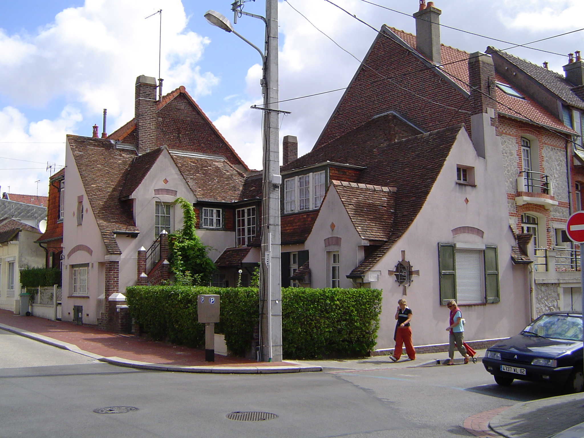 Photo de la villa "Pomme d'Api" au Touquet-Paris-Plage